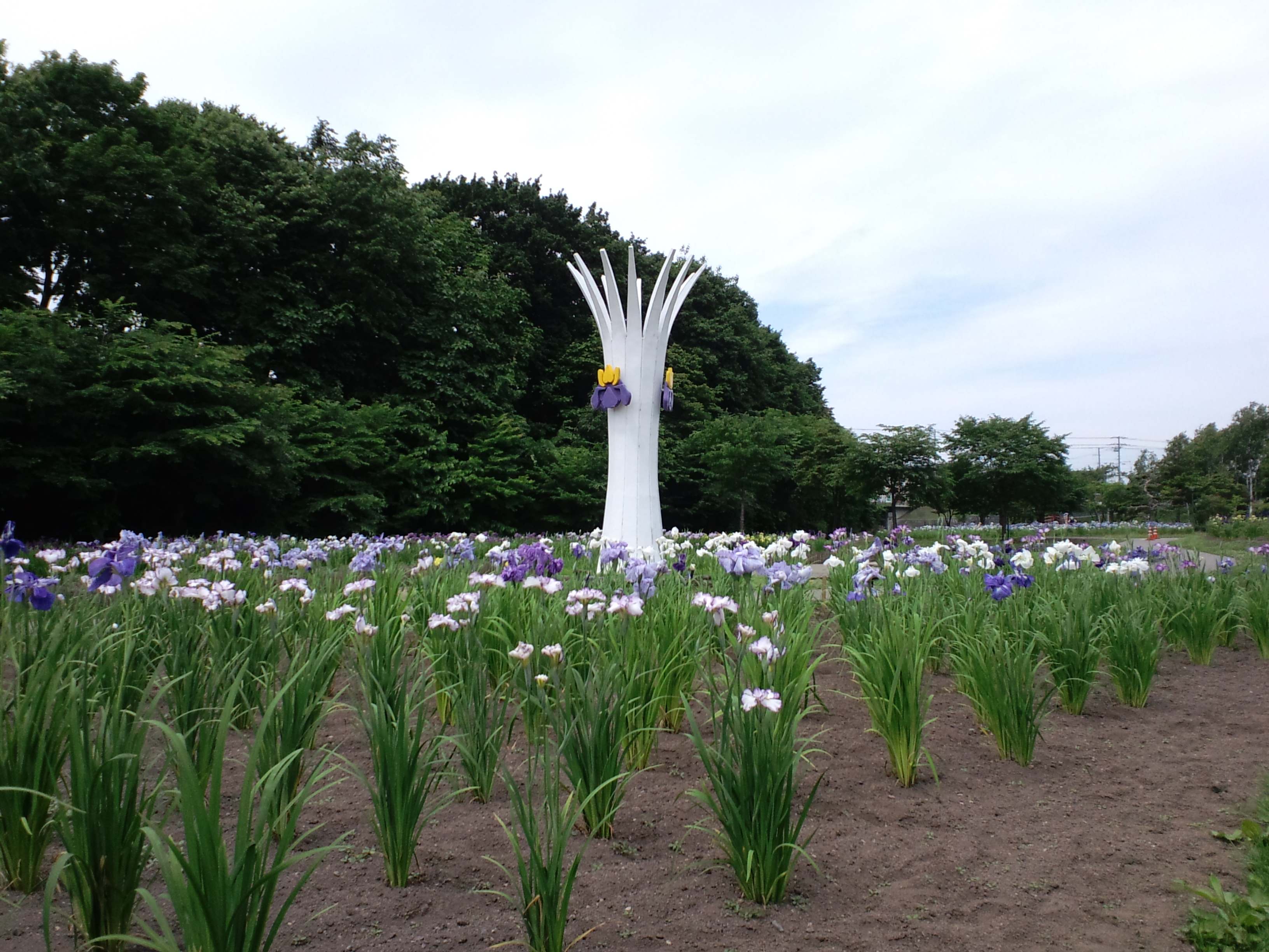 あやめ公園・アヤメ花壇とモニュメント